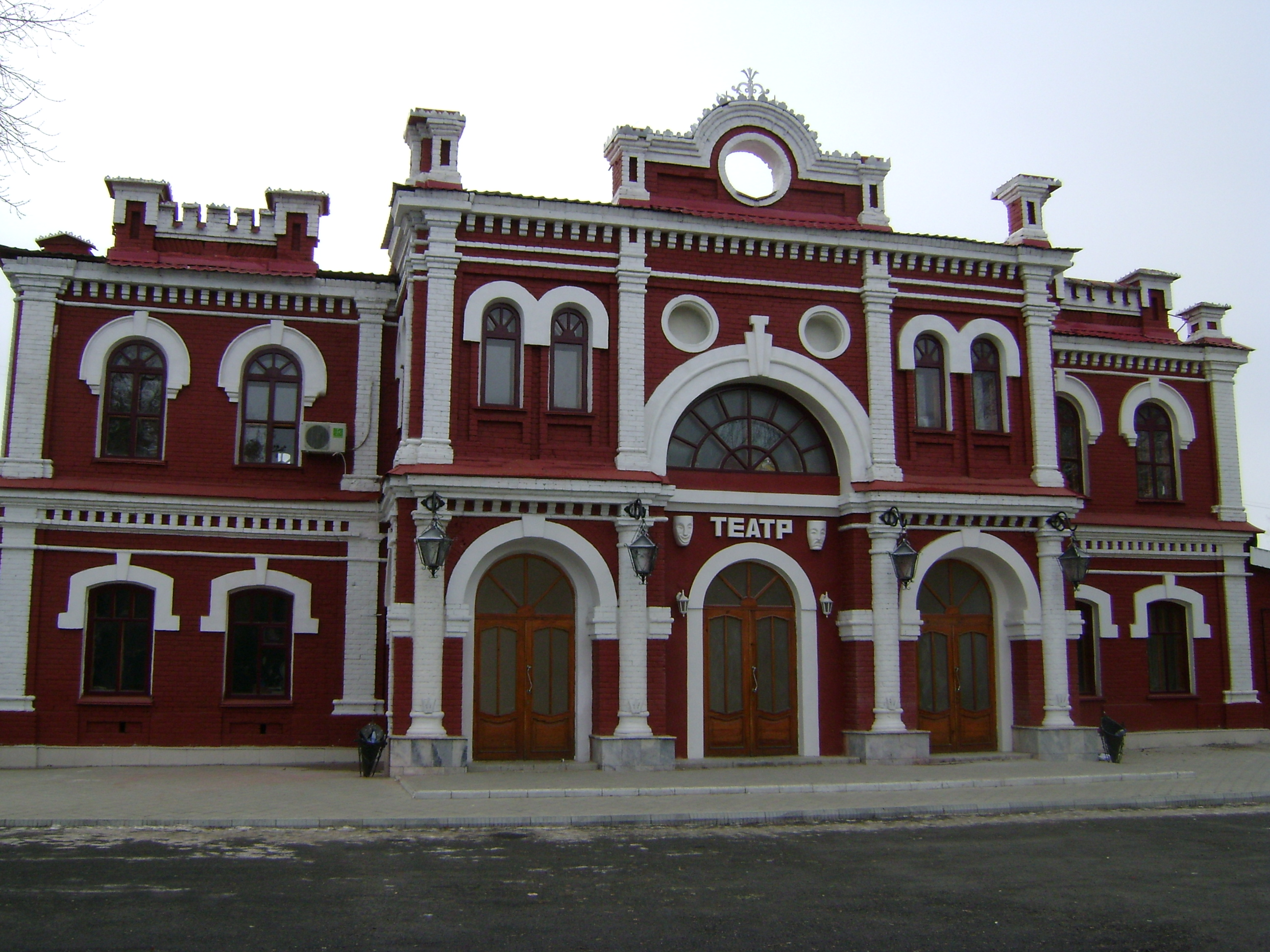 Драмтеатр города Усть-Каменогорска